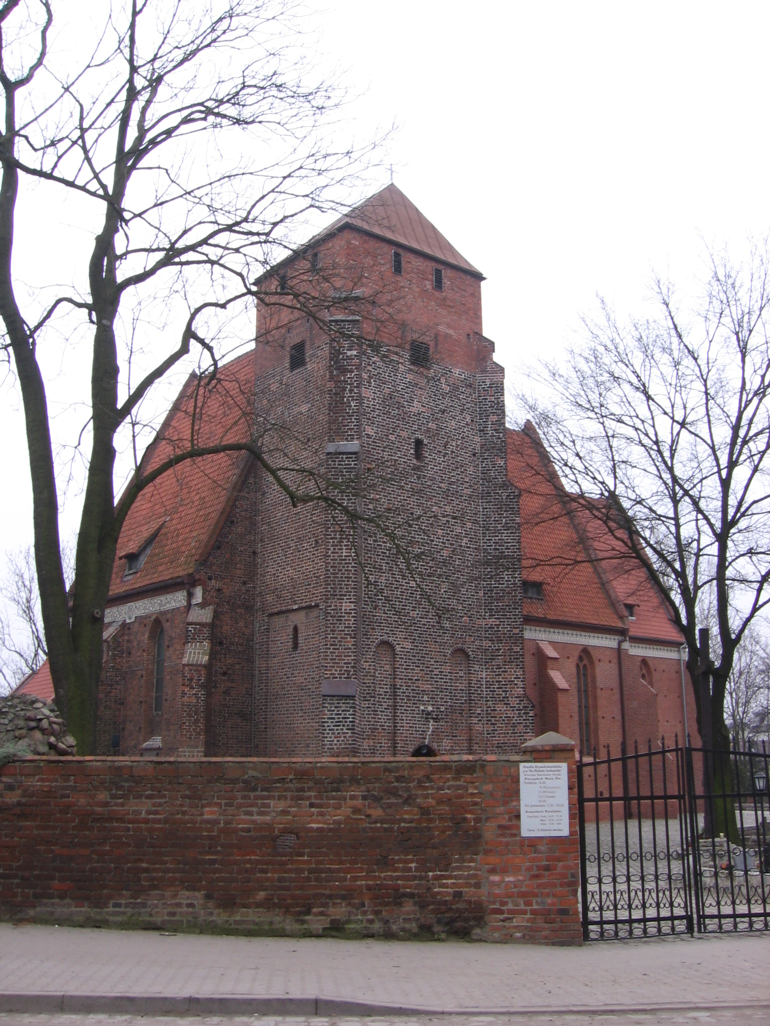 Muchobór Wielki we Wrocławiu: kościół św. Michała Archanioła przy skrzyżowaniu ulic Stanisławowskiej i Rakietowej